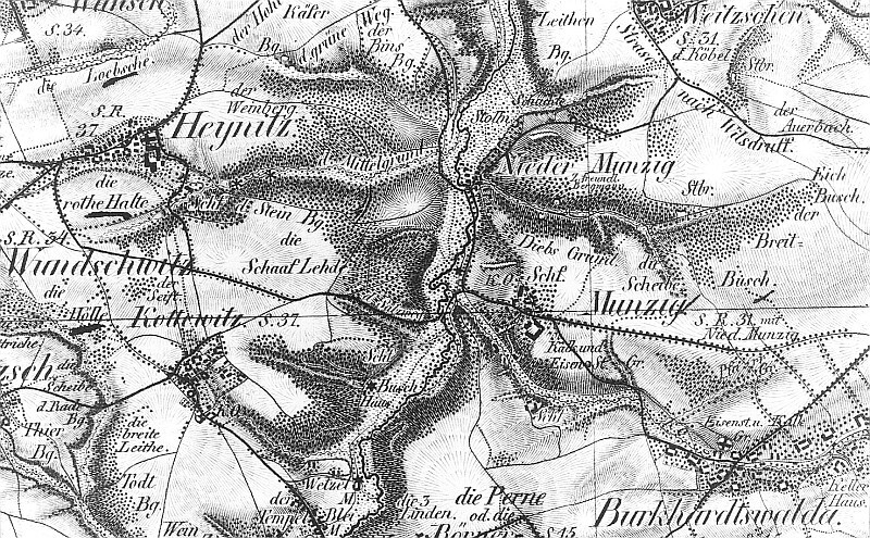 Original image description from the Deutsche Fotothek Triebischtal-Munzig. Ausschnitt aus: Oberreit, Sect. Freiberg, vor 1843